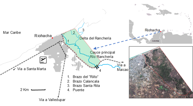 Ubicacion del delta del río Ranchería, y distribucion de los canales al interior de este.